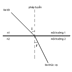 miêu tả hiện tượng khúc xạ.